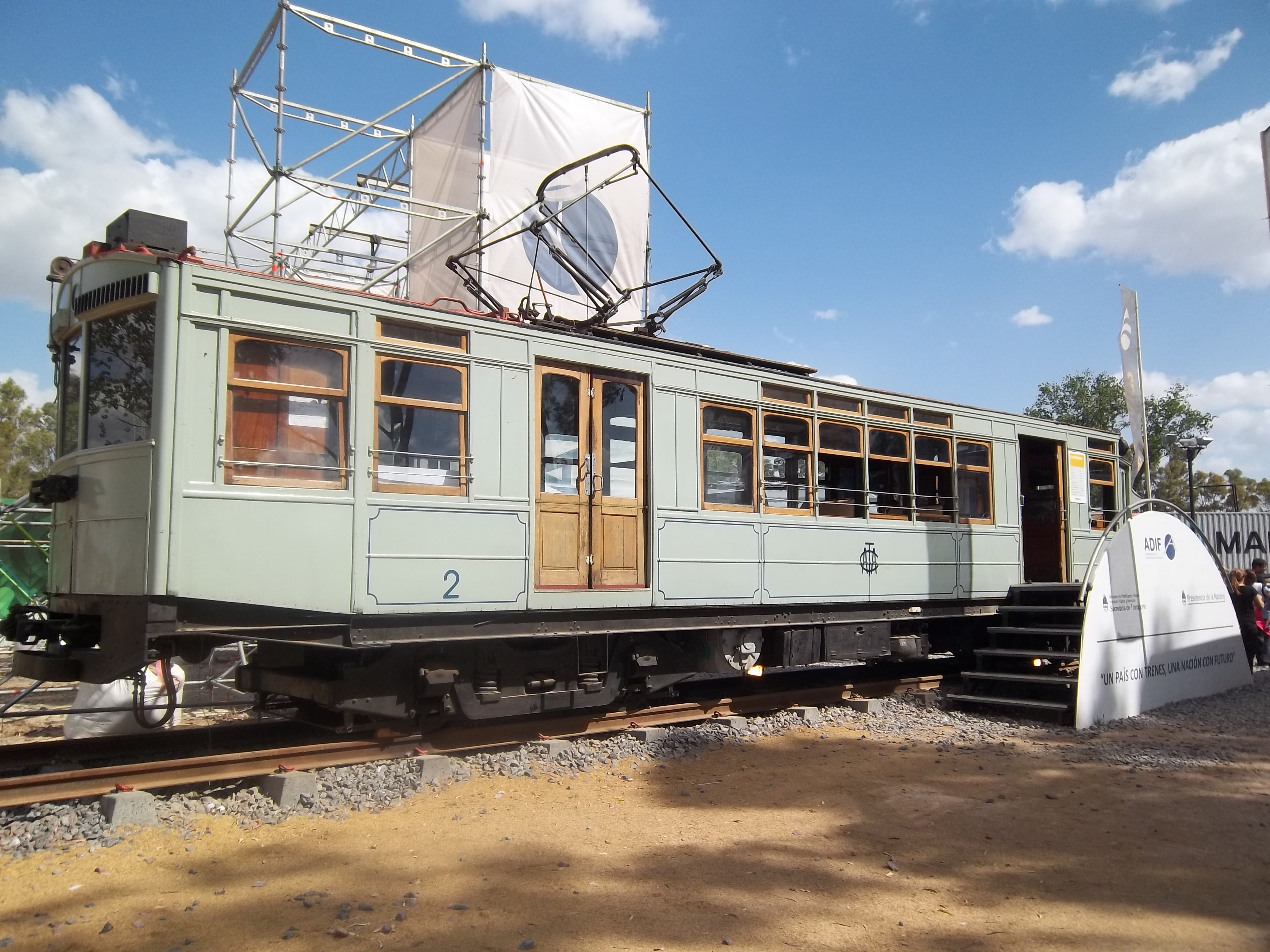 Coche Preston construido en 1913 por United Electric Co para circular en la línea A del subterráneo de Buenos Aires. Fue retirado en 1977 y donado a la Asociación Amigos del Tranvía en 2001. Expuesto en Tecnópolis, partido de Vicente López, provincia de Buenos Aires, Argentina.